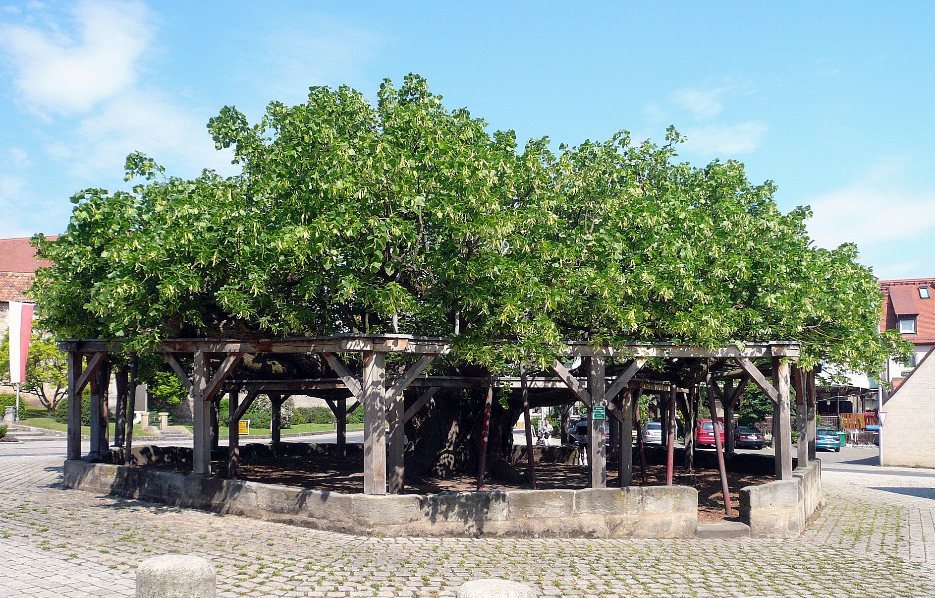 Die Tanzlinde ist eine Sommer-Linde (Tilia platyphyllos) auf dem Dorfplatz, gegenüber der Wehrkirche im oberfränkischen Effeltrich. Die auffällige Wuchsform der Linde, flach-oval gestaltete Krone, ist auf die Bastgewinnung für die Obstbaumzucht zurückzuführen. Sie diente jahrhundertelang als zentraler Versammlungs-, Thing- und Gerichtsort.